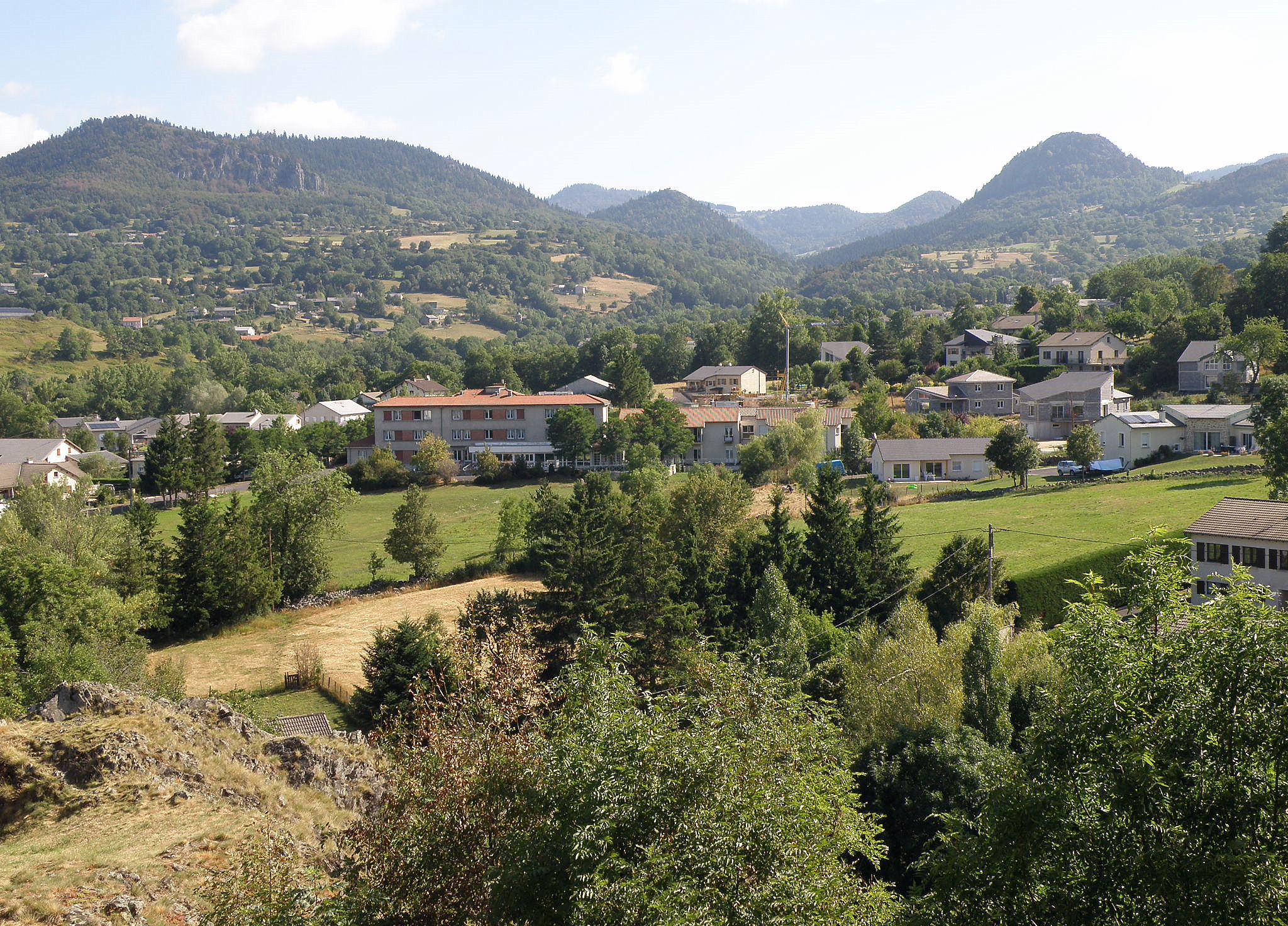 Saint-Julien-Chapteuil, dép. de la Haute-Loire, France (région Auvergne). Vue sur les sommets de Saint-Julien-Chapteuil, depuis la butte de l’église, par un coup d’oeil en direction du nord-est. On distingue : - à gauche, le mont Chanis (1231m), avec à son pied le village de Montchanis ; - au centre, la silhouette conique du mont Rouge (1159m) ; - à droite, le Peyre de Bard (1200m), avec son aspect de morne au sommet arrondi ; - la forme conique du mont Chabrier (1230m, commune de Queyrières) émergeant de derrière le Peyre de Bard, à la gauche de celui-ci. Les maisons à l’avant-plan font partie du bourg de Saint-Julien.